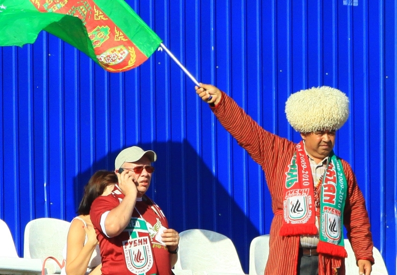 Туркменский болельщик ФК Рубин